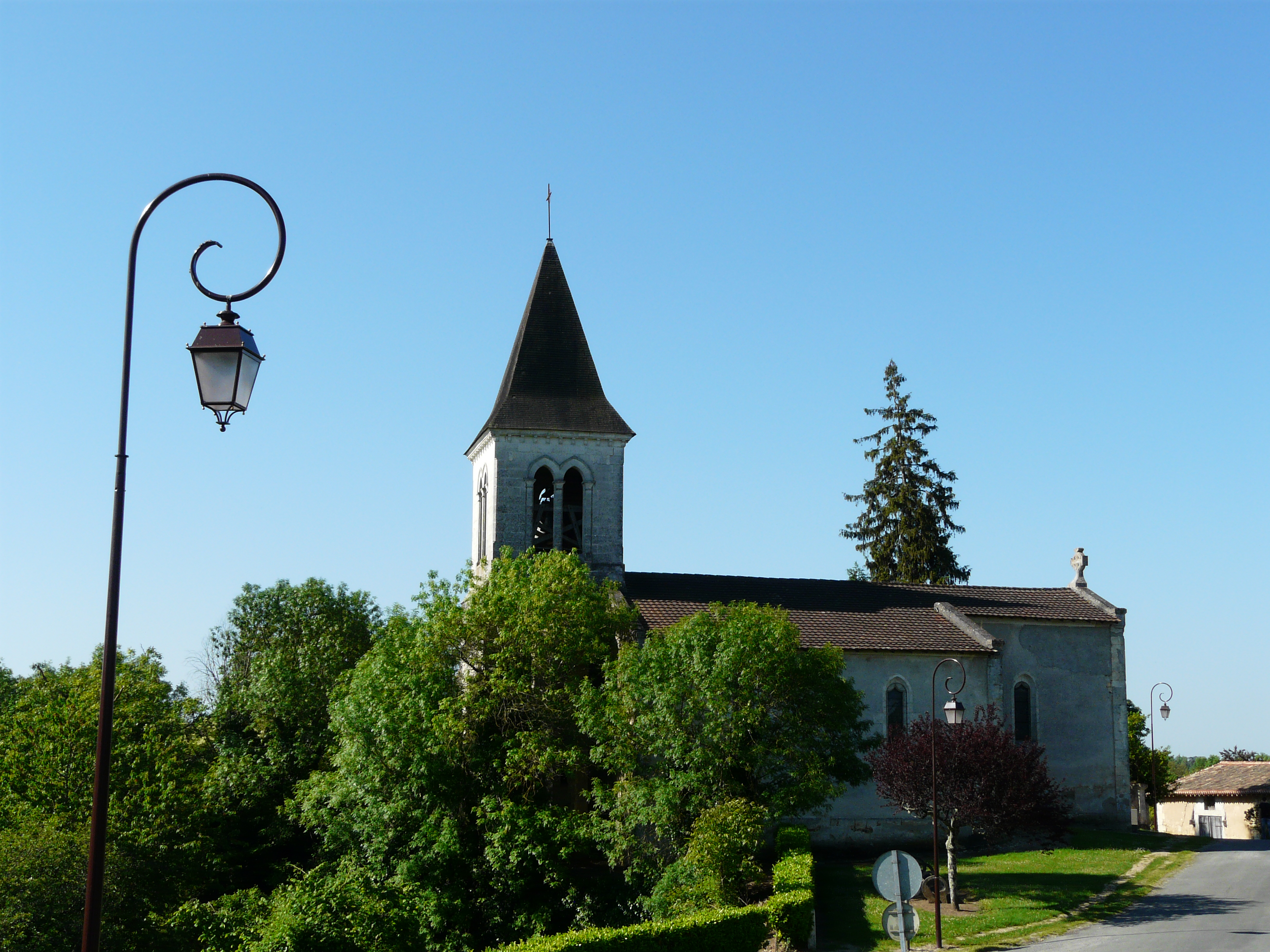 Le côté nord de l'église Saint-Front, Saint-Front-de-Pradoux, Dordogne, France.